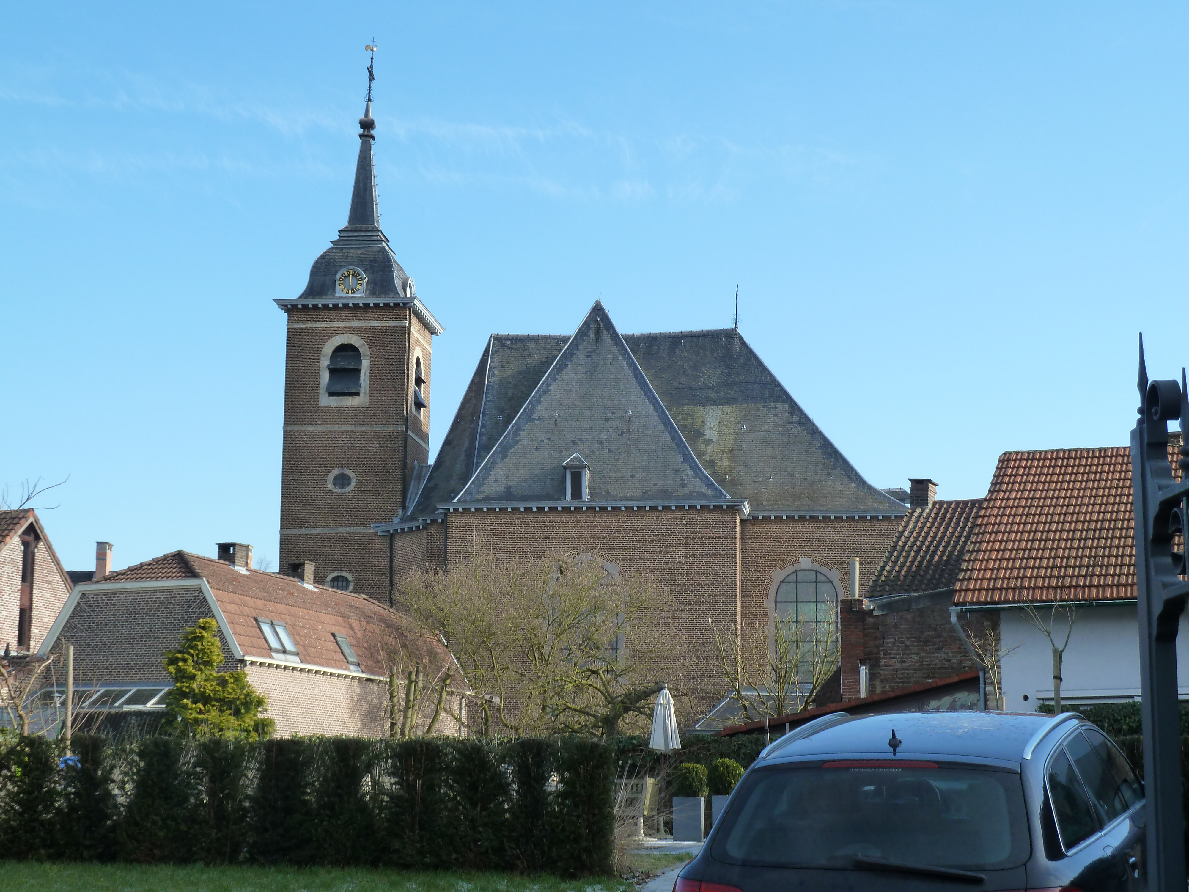 Kerk van Oud-Rekem, Limburg, België